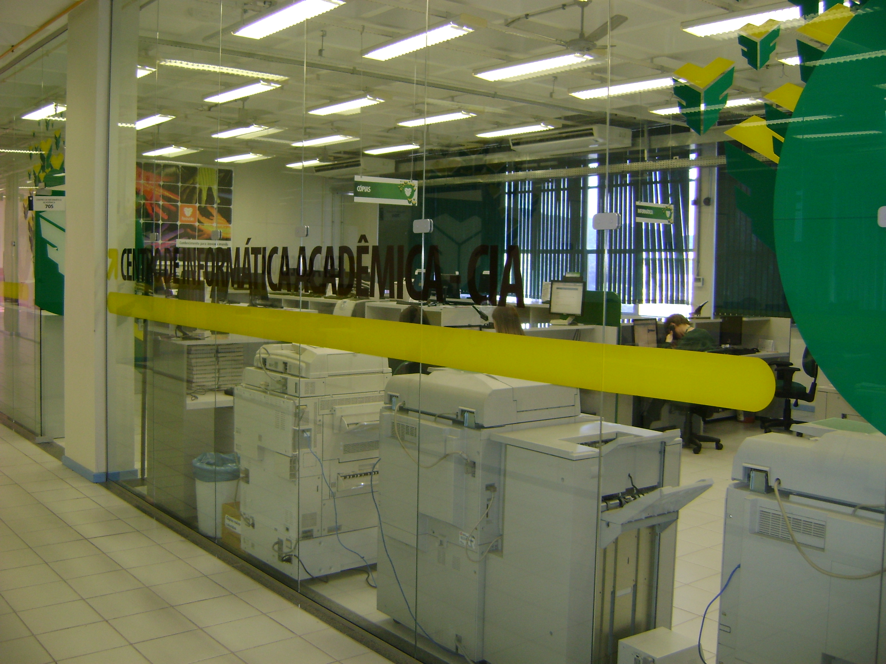 Universidade Feevale